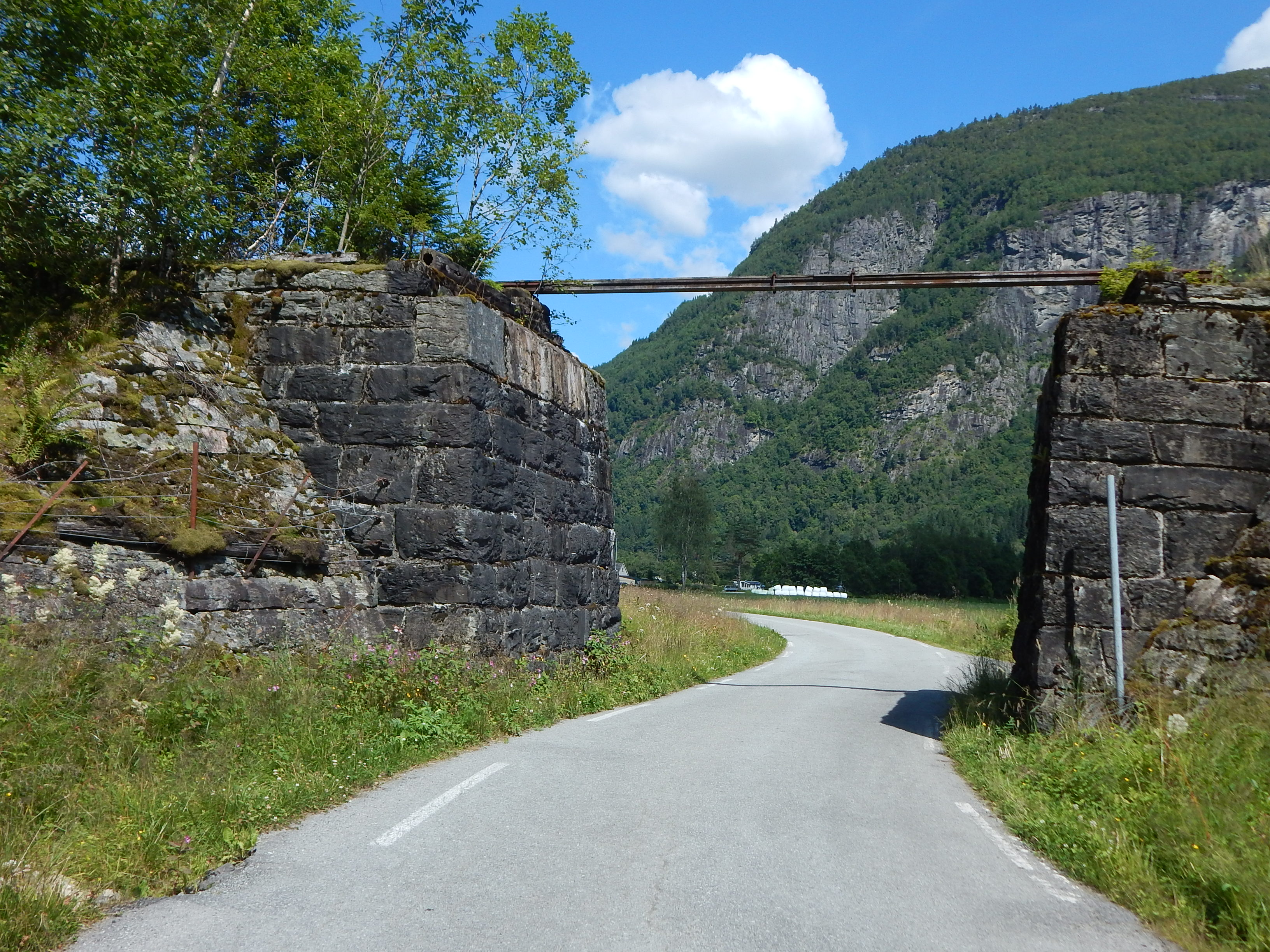 Nesheimsvegen (fylkesvei 305) ved en tidligere undergang på Hardangerbanen